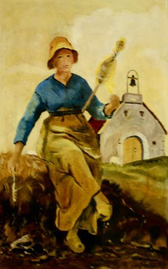 peinture de sainte Florine façon Millet par Bernard Vivier. En arrière plan : la chapelle Sainte-florine de Mazoires dite sainte Pezade